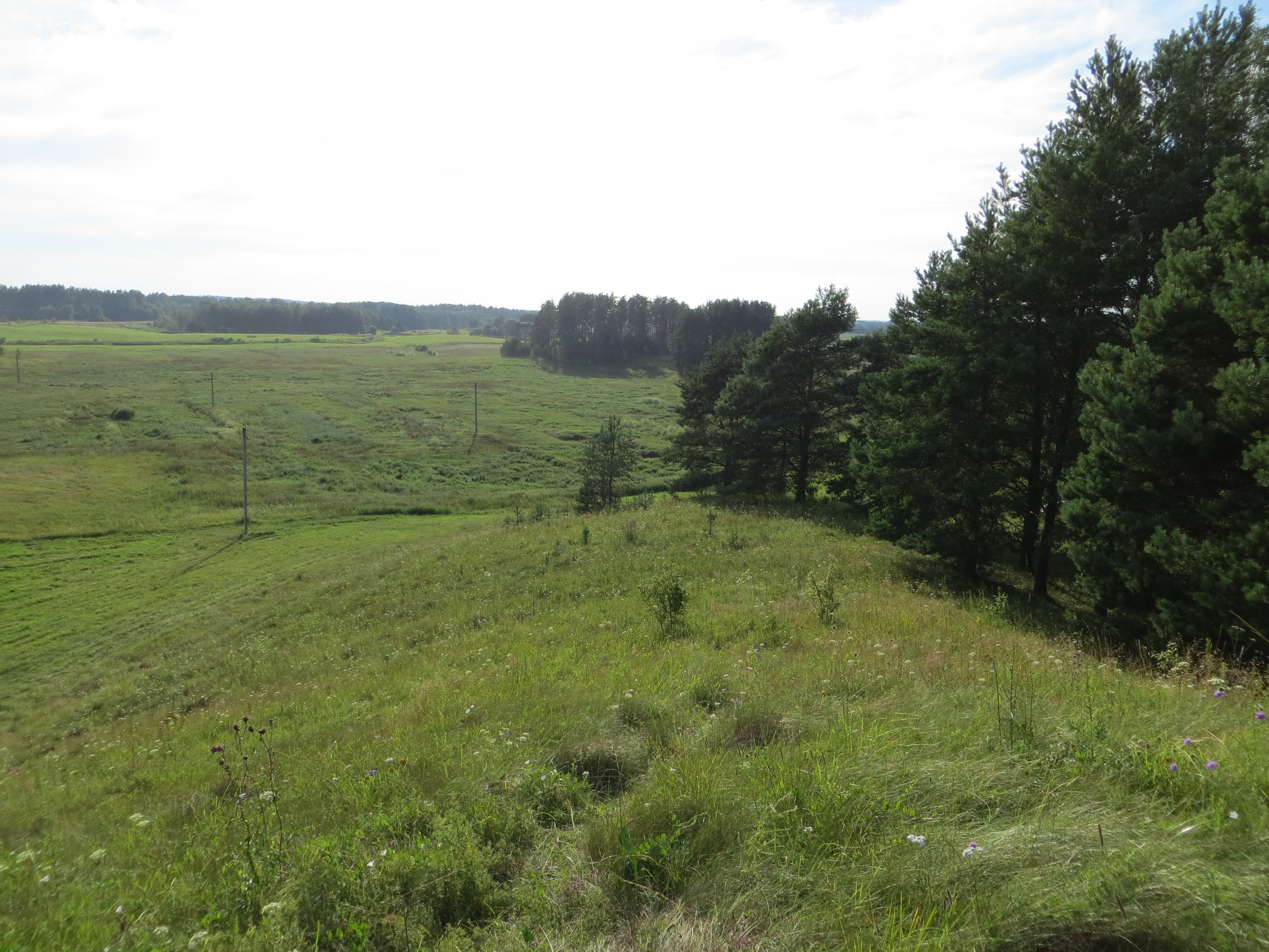 Saldutiškio sen., Lithuania